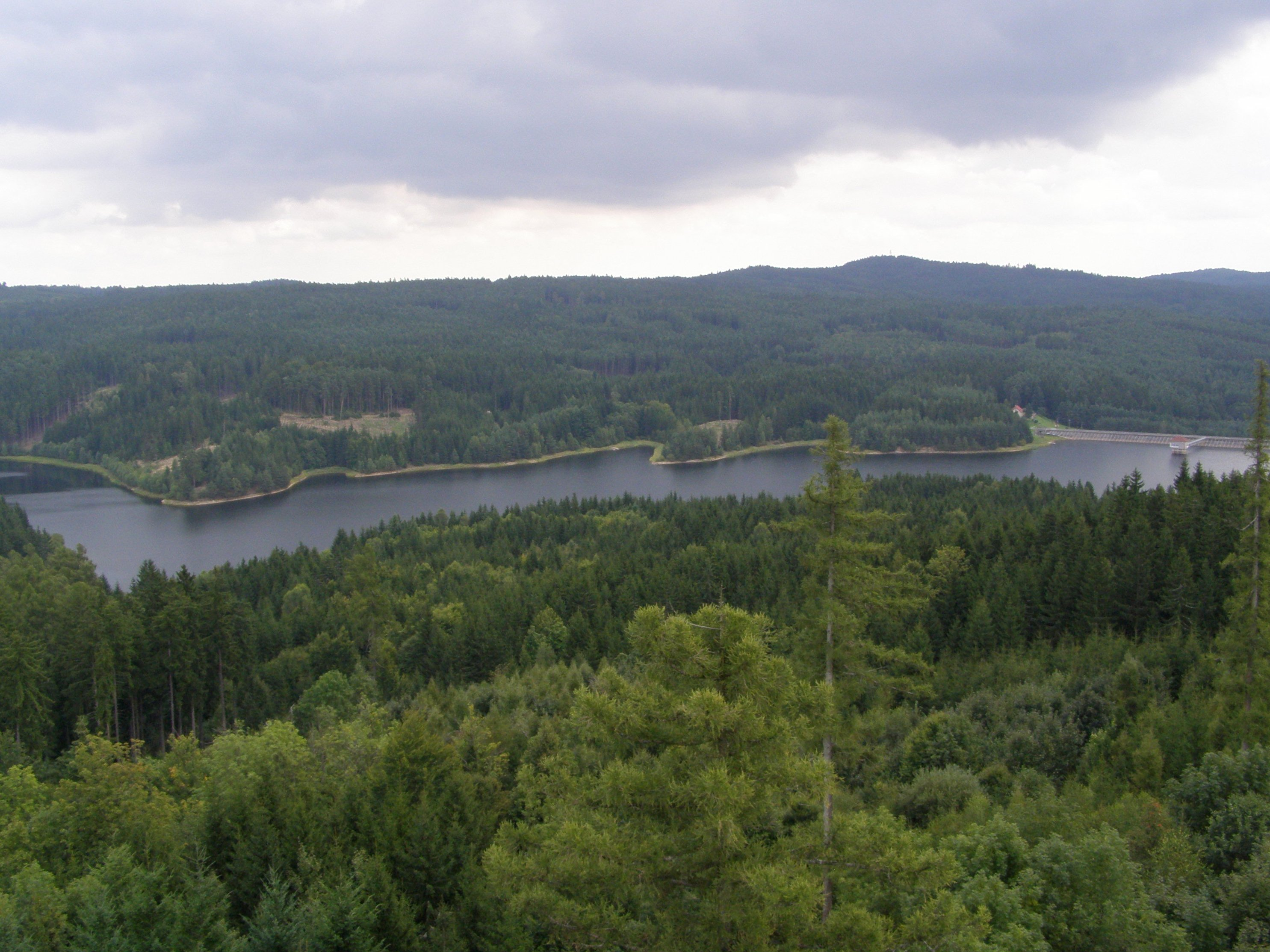 Staré Město pod Landštejnem, Vodní nádrž Landštejn, Vysokokamenská vrchovina pohled z hradu Landštejn